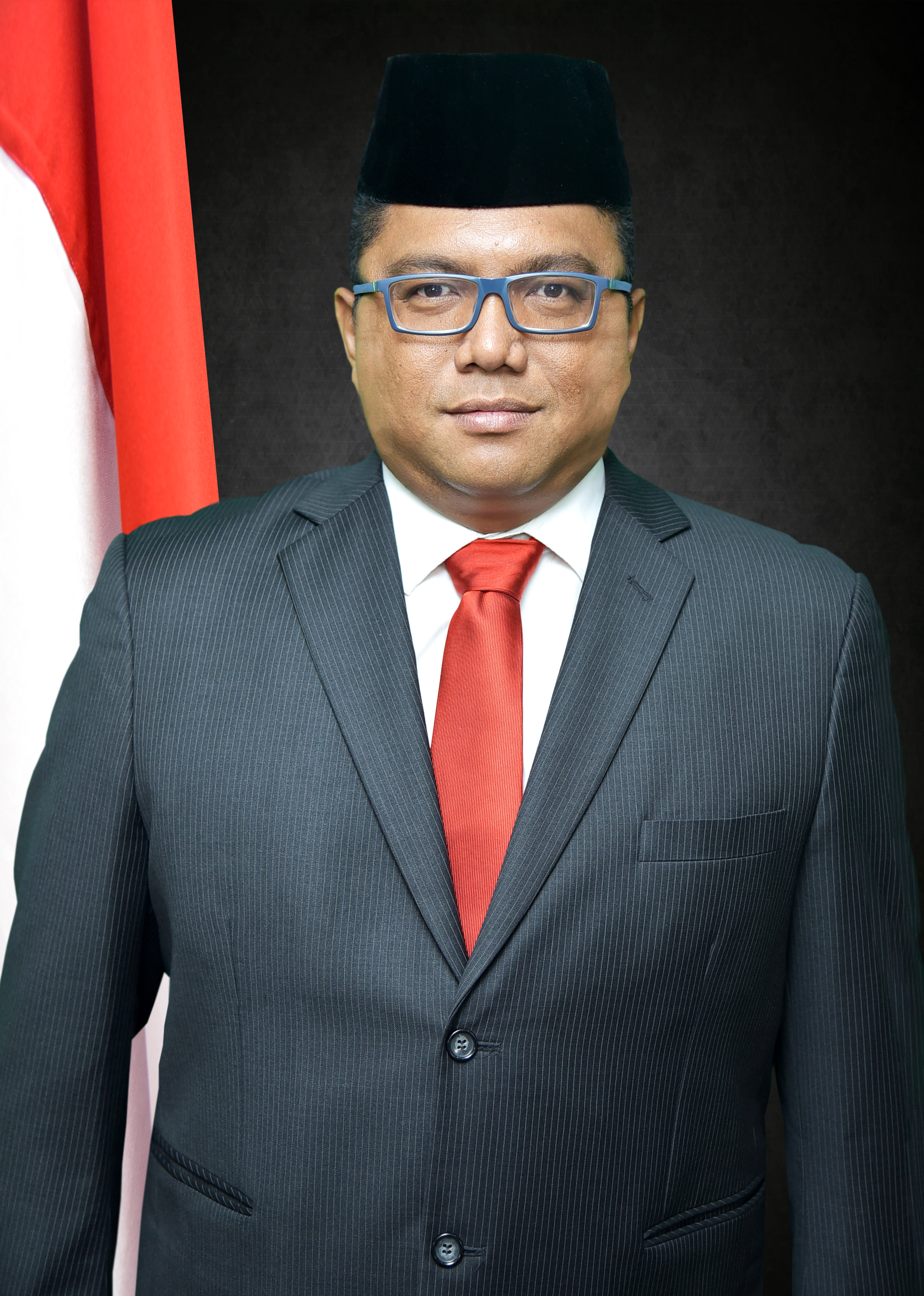 Anggota Bawaslu RI Fritz Edward Siregar